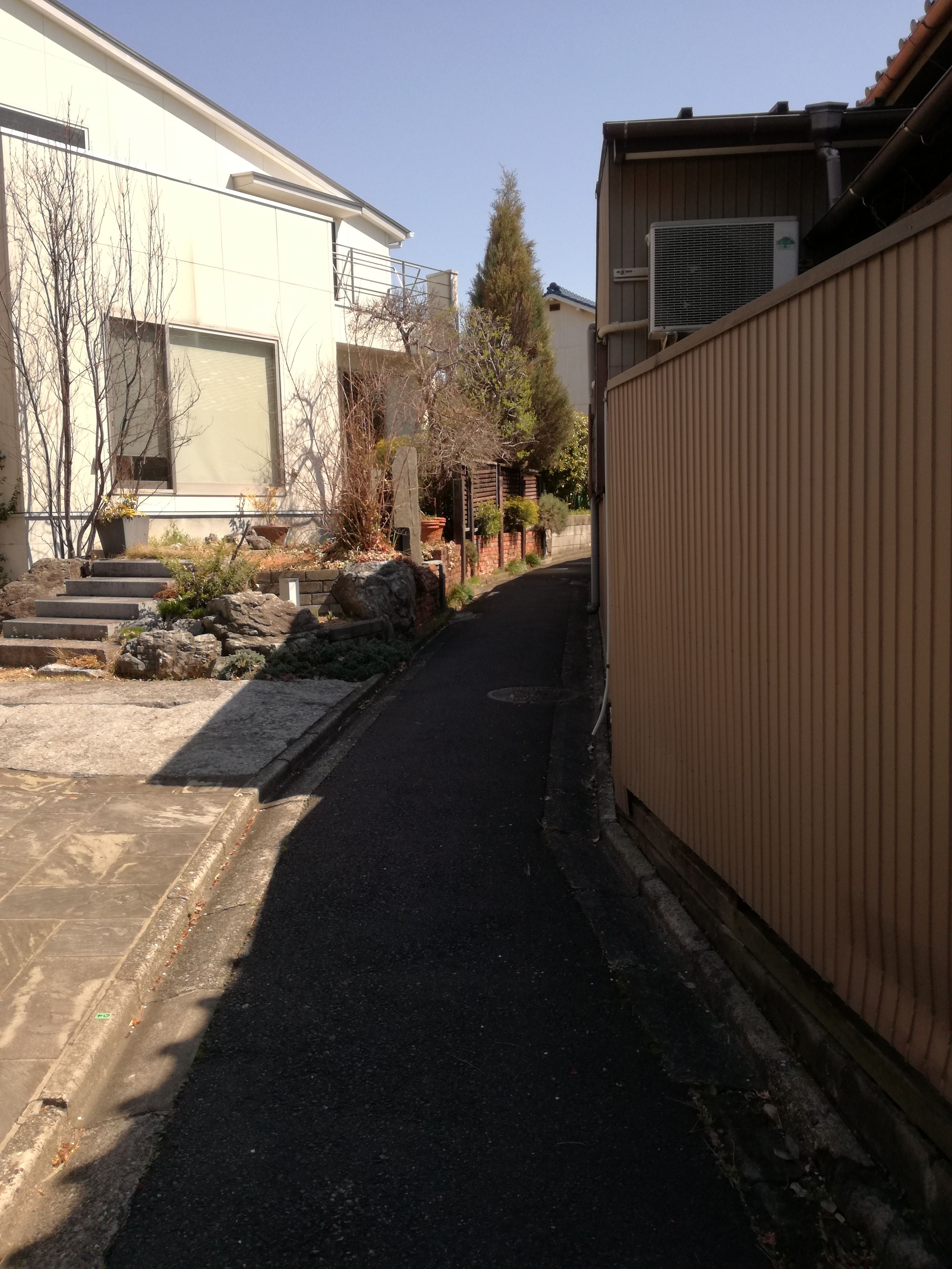 瑞穂区上野街道